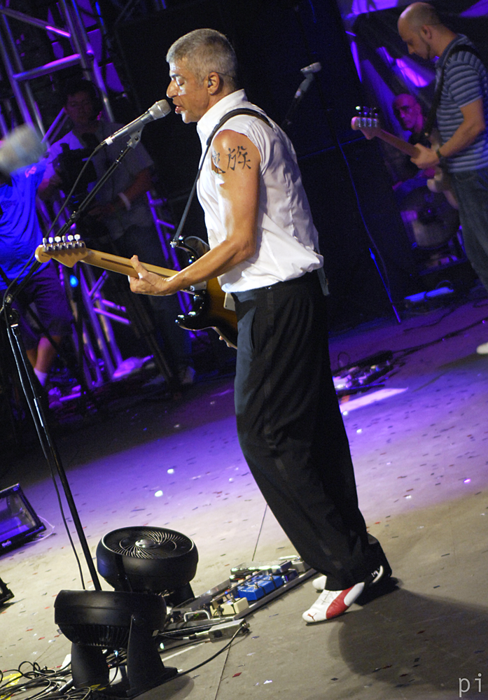 Lulu Santos no Show da Virada Paulista de 2007 pra 2008.